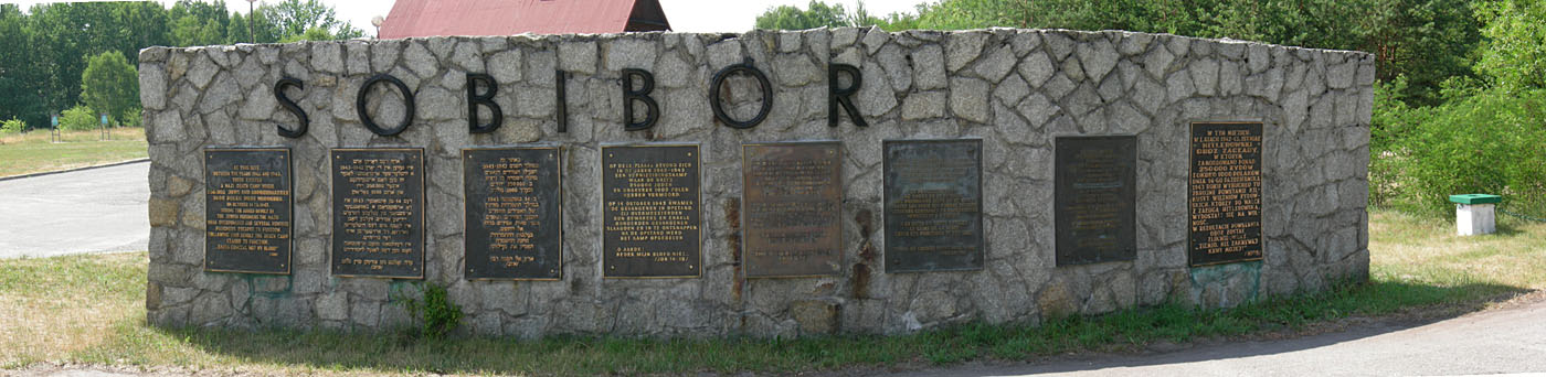 Sobibór - Mémorial à l'entrée du camp.